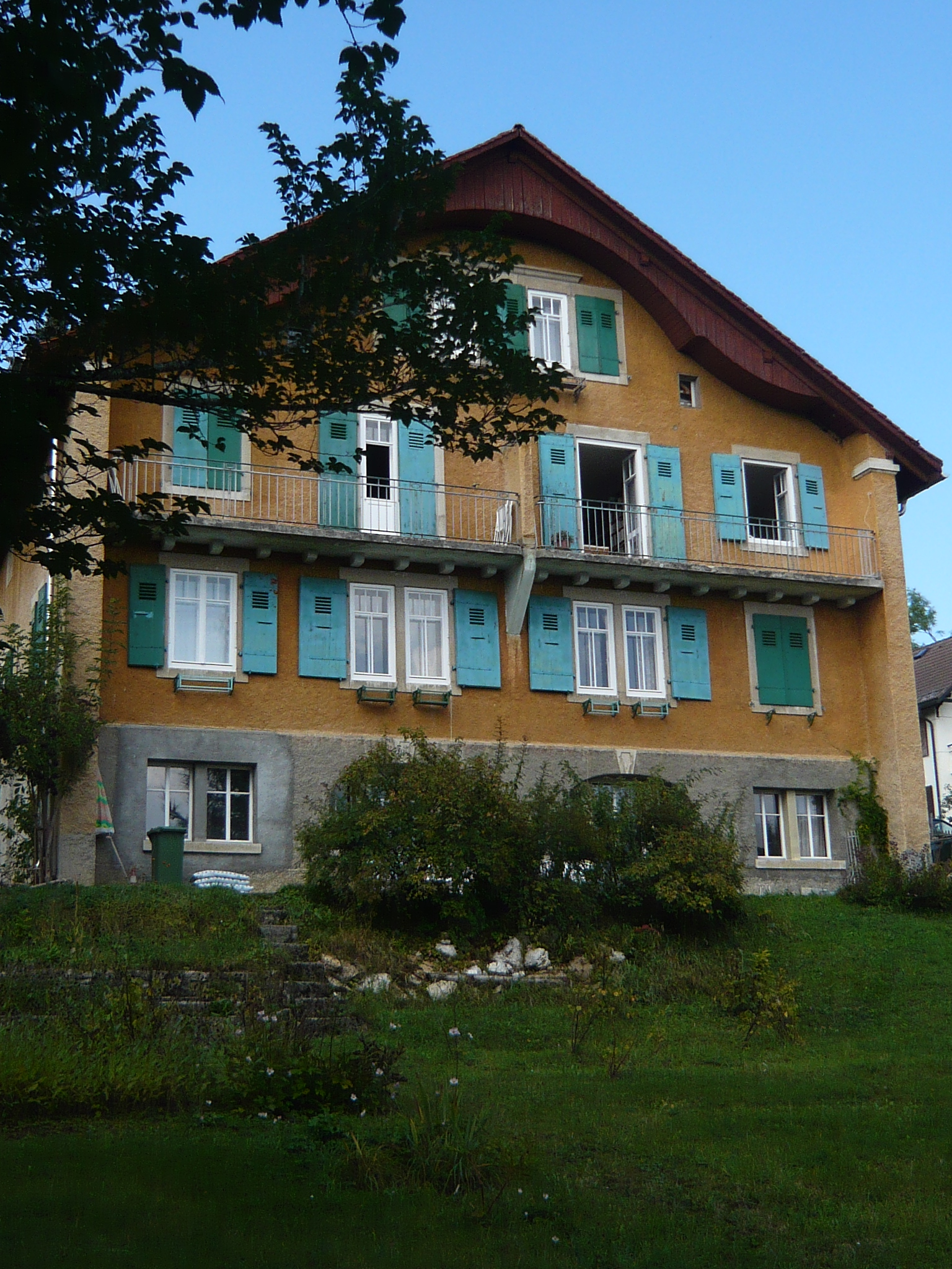 Maison du KCE située Rue des Postiers 27 à La Chaux-de-Fonds